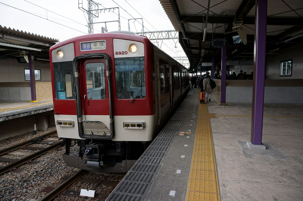 天理線内折り返し電車 Sony ILCE-6000